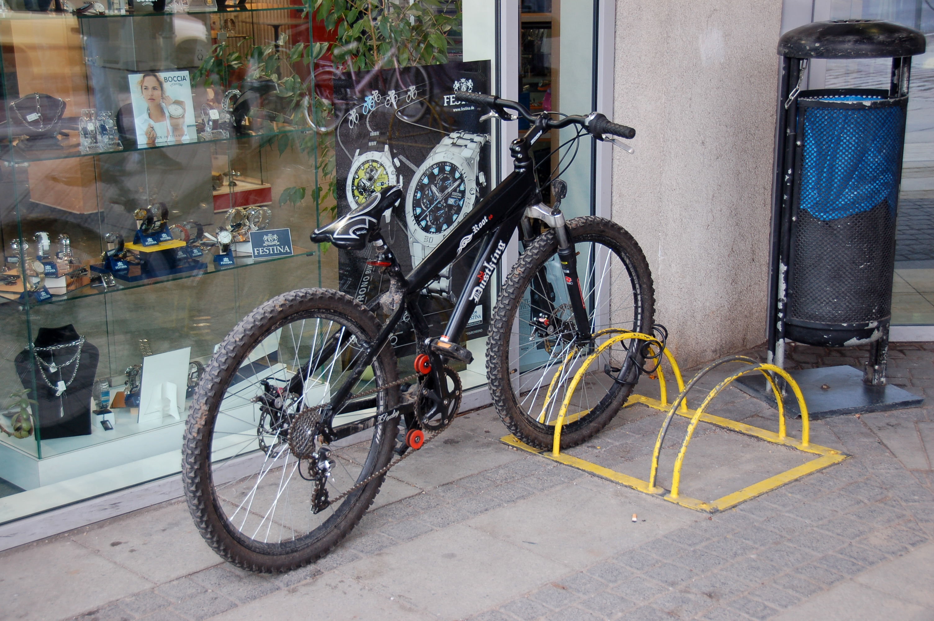 Fahrradtechnik